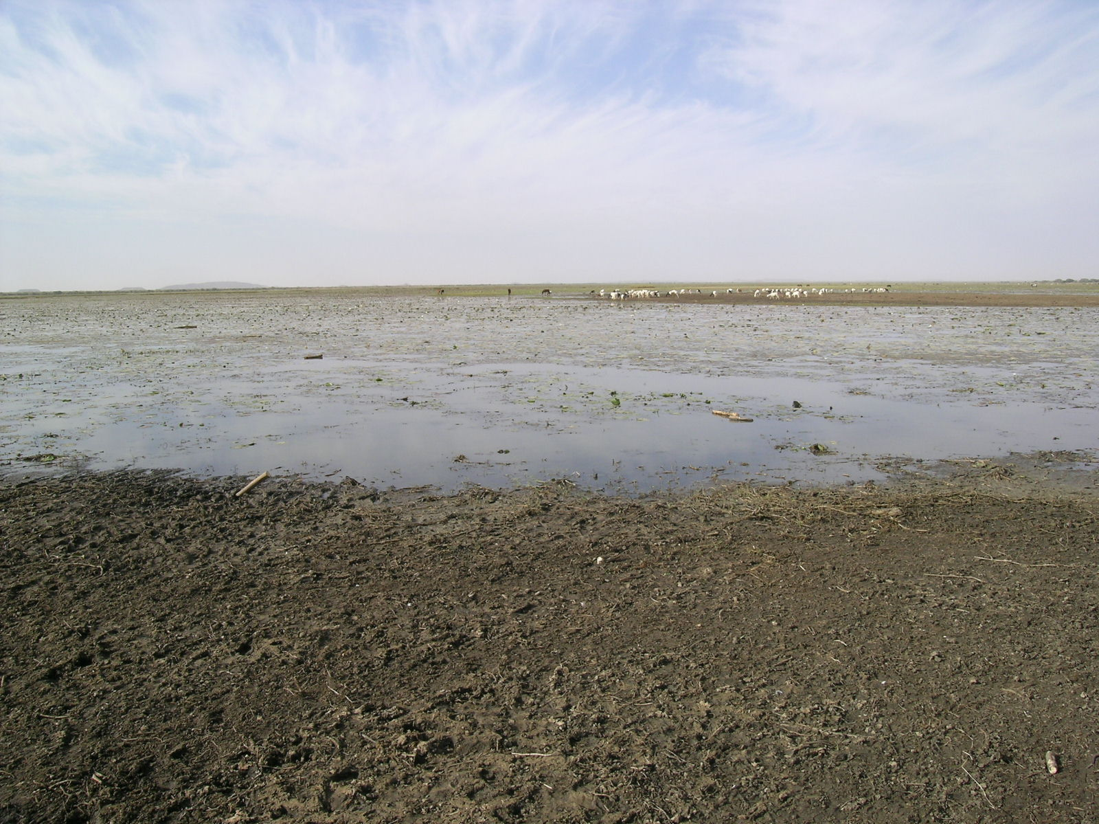 Mare D'Oursi in der Trockenzeit, NW von Gorom-Gorom